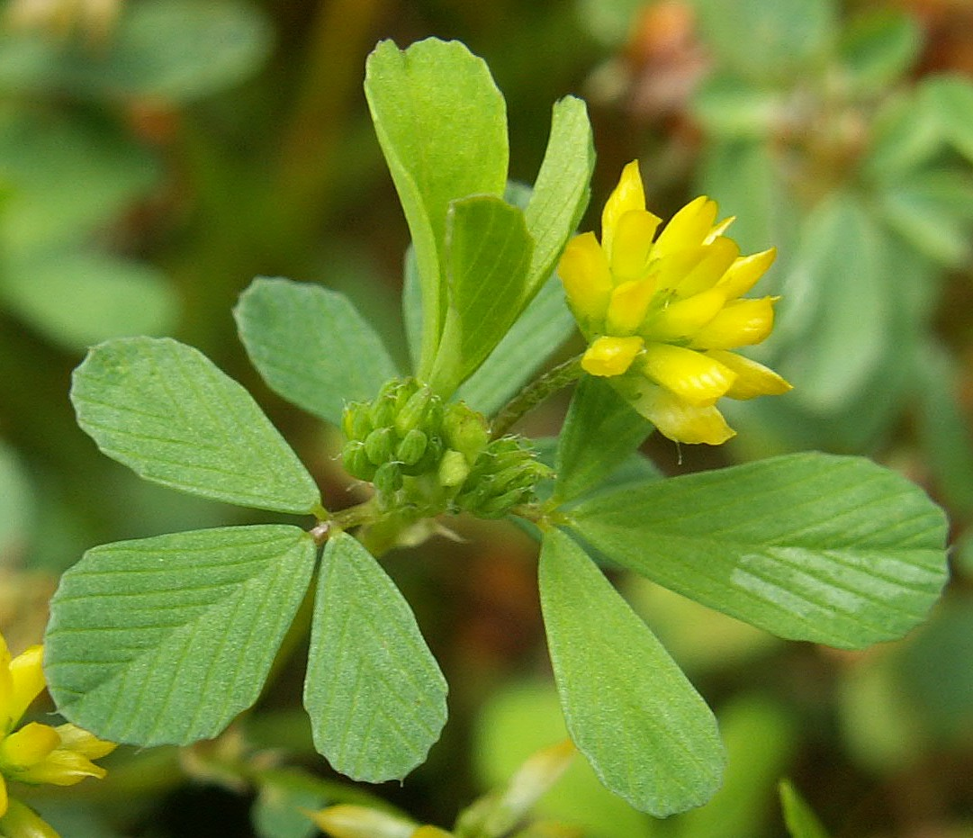 Trifolium dubium. Worowo near Lobez, NW Poland